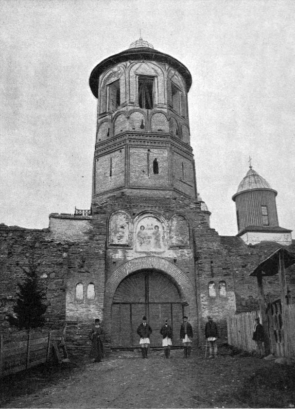 Imagine a turnului Mănăstirii Brebu din anul 1899